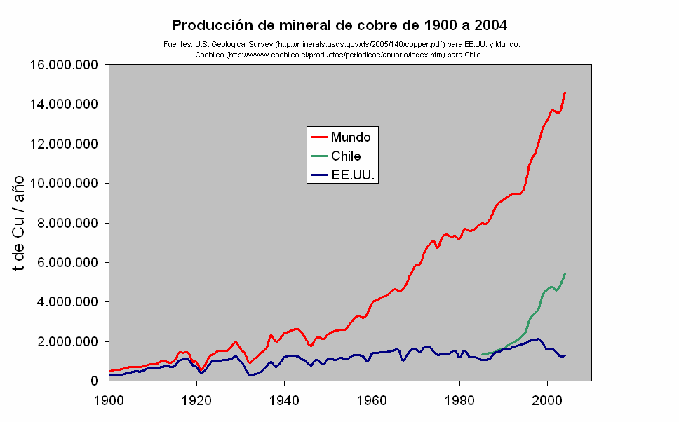 Producción de mineral de cobre. Datos de 1900 a 2004 para EE.UU. y el total mundial; de 1985 a 2004 para Chile.